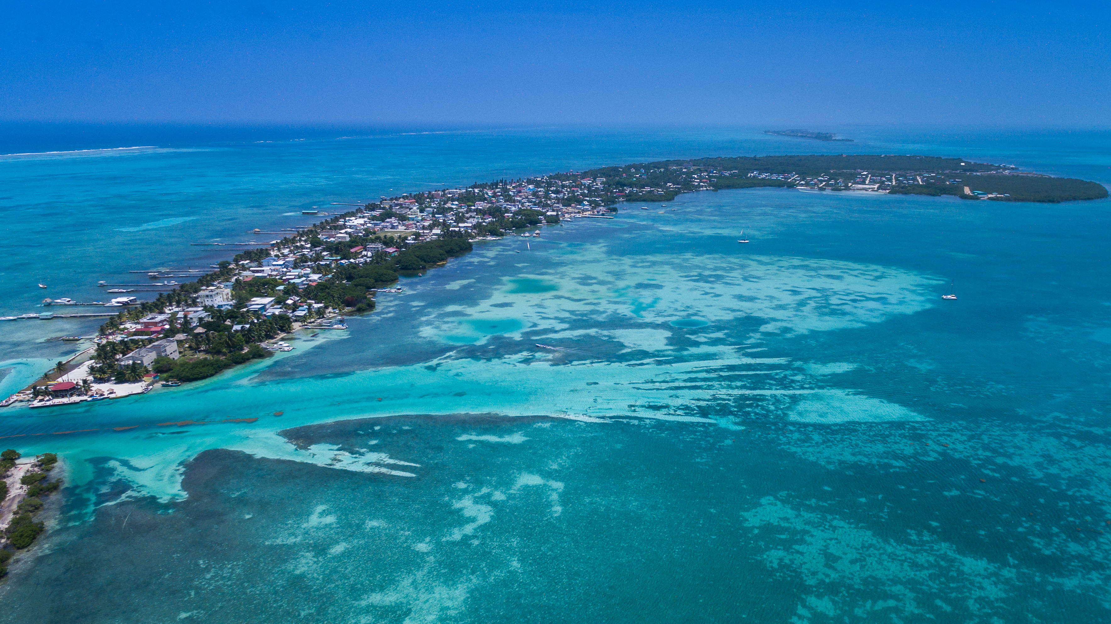 beautiful island in Belize, Caye Caulker